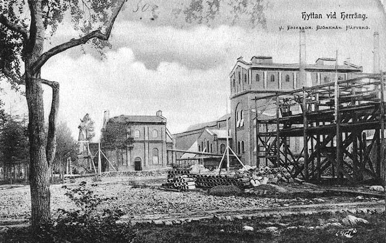 Herräng, hyttan omkring 1907. Foto efter gammalt vykort